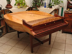 Imagen del Laud-CLave